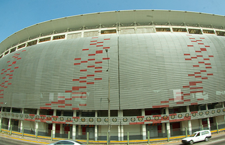 Estadio nacional de Lima, visto desde el metropólitano